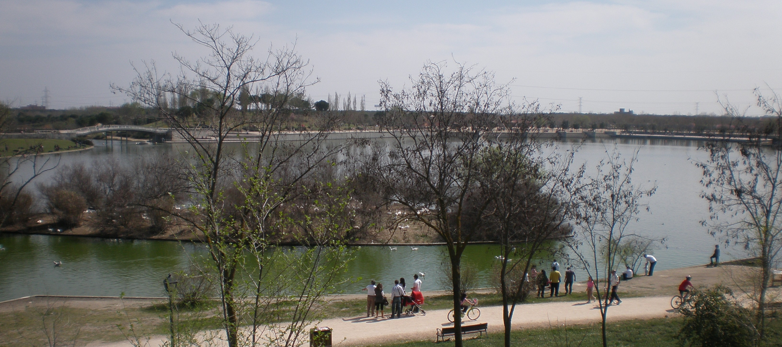 Laguna de Mari Pascuala. Parque Polvoranca. Madrid. España.